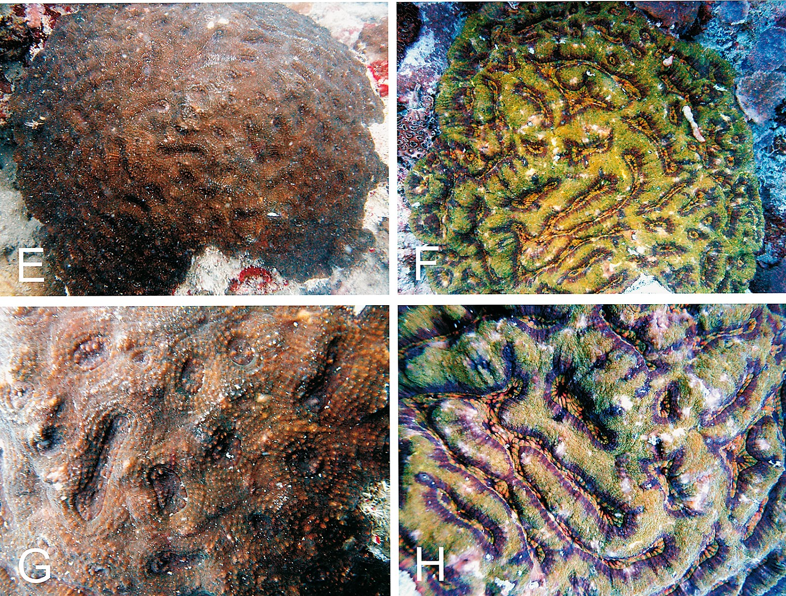 Parascolymia rowleyensis (previamente Australomussa) (E-G) fotografiadas in situ: E) WAM Z65786; F) WAM Z65785; G) primer plano de la misma colonia que en E; H) primer plano de la misma colonia que en F. Roberto Arrigoni et al. (2014) Taxonomy and phylogenetic relationships of the coral genera Australomussa and Parascolymia (Scleractinia, Lobophylliidae). Contributions to Zoology, 83 (3)